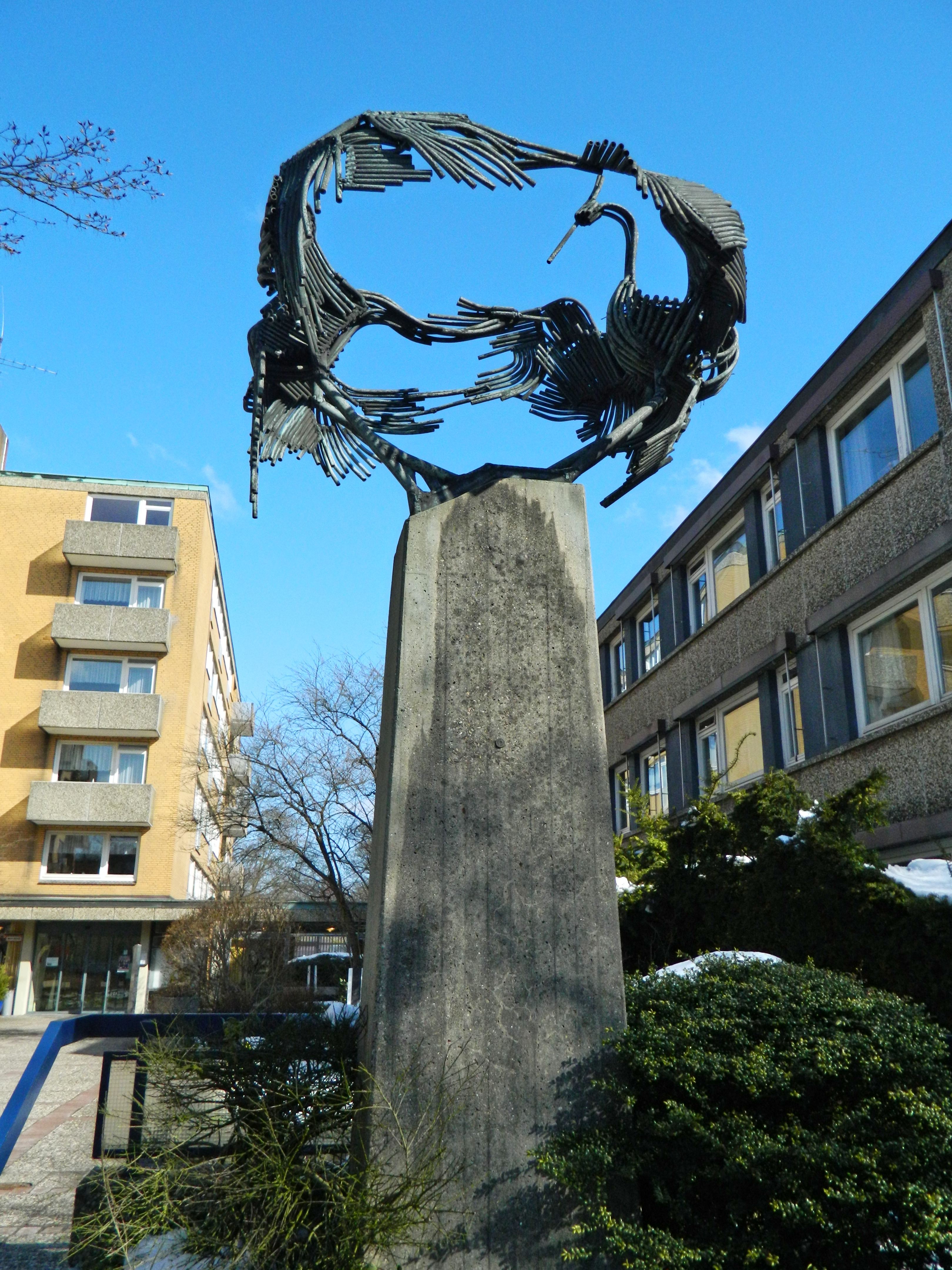 Dulsberg, 22049 Hamburg, Germany. Vögel von Karl Heinz Engelin, 1970, Kiefhörn 1–3